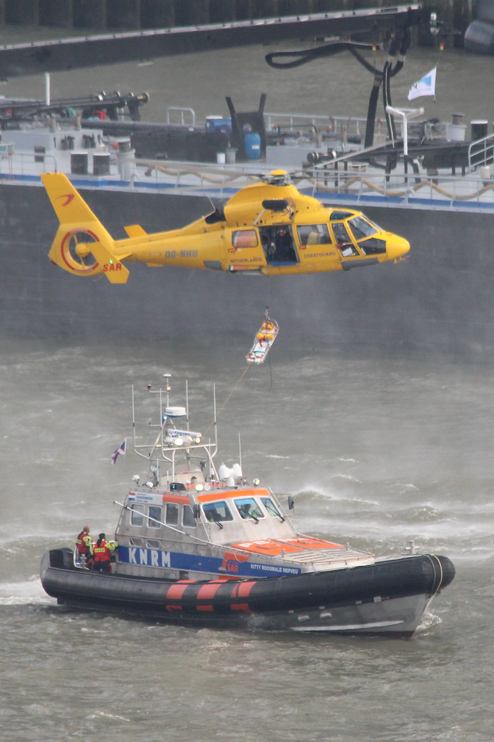 Demonstraties en activiteiten tijdens de Wereldhavendagen 2016 in Rotterdam